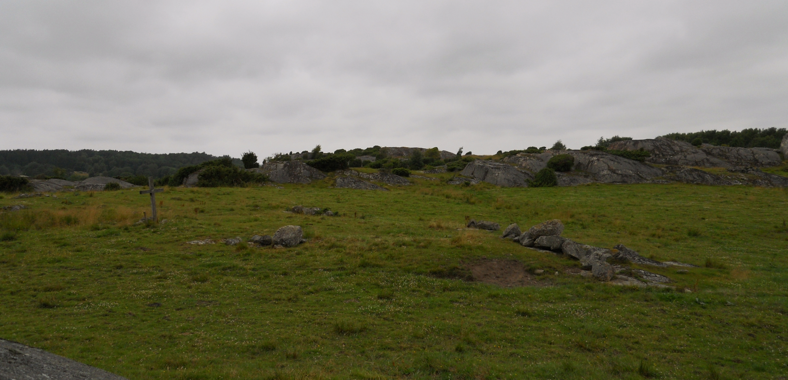 Ruinen efter högendiskyrkan på Tjörn, "Vår Frus kyrka" eller tidigare även kallad capella beate Marie virginis, dvs den saliga Jungfru Marias kapell. Kyrkan byggdes troligen på 1100-talet och var i bruk fram till 1500-talet. Platsen är utmärkt med ett träkors.